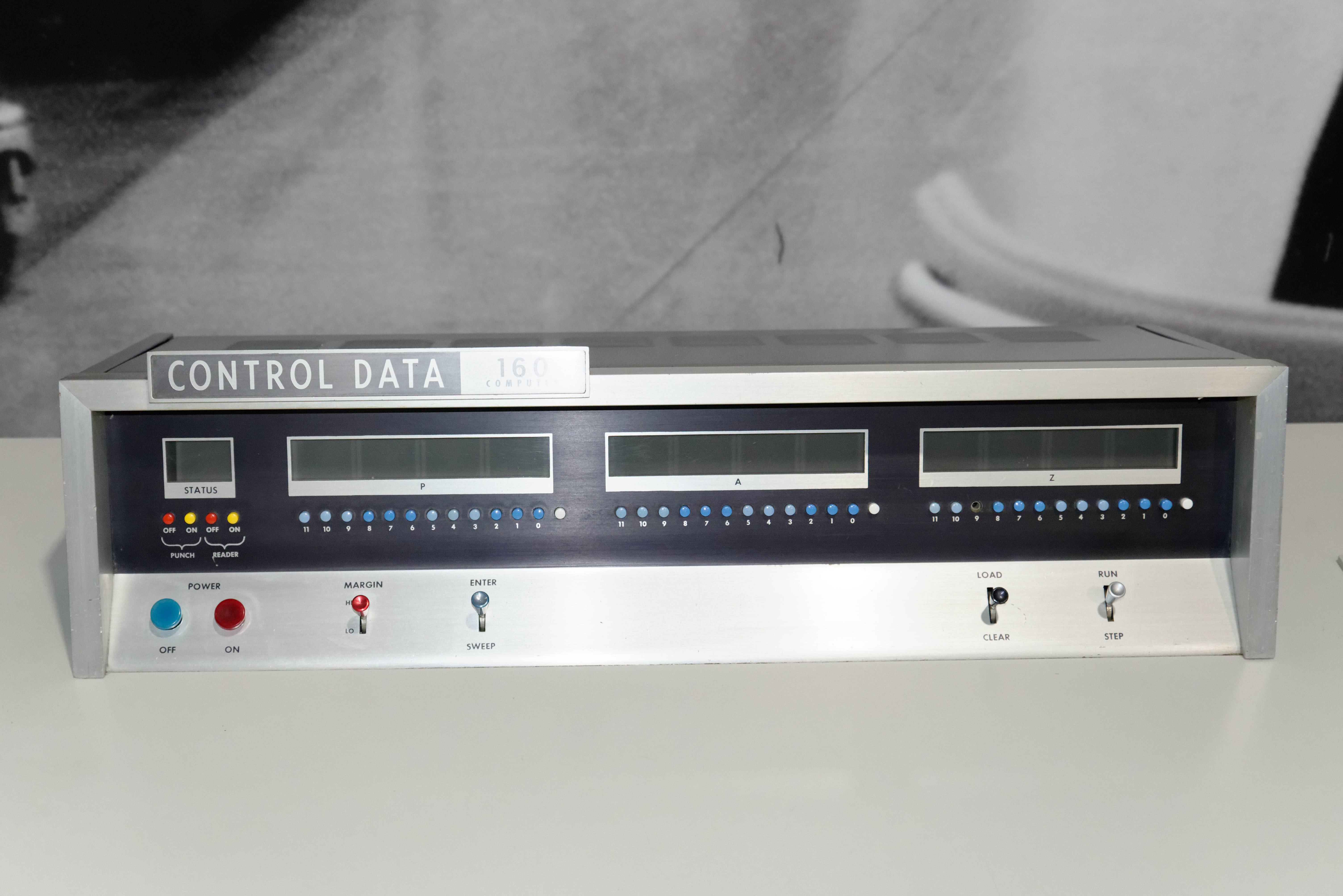 Control Data CDC 160 computer